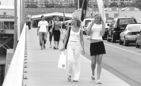 Stadtbrücke Frankfurt/Oder